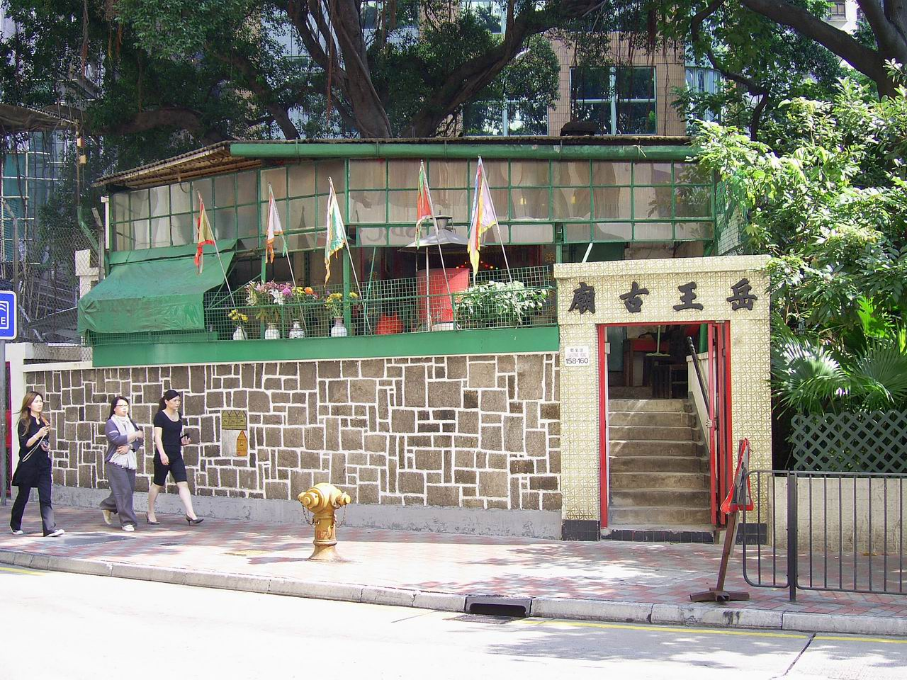 中文（香港）: 銅鑼灣岳王古廟